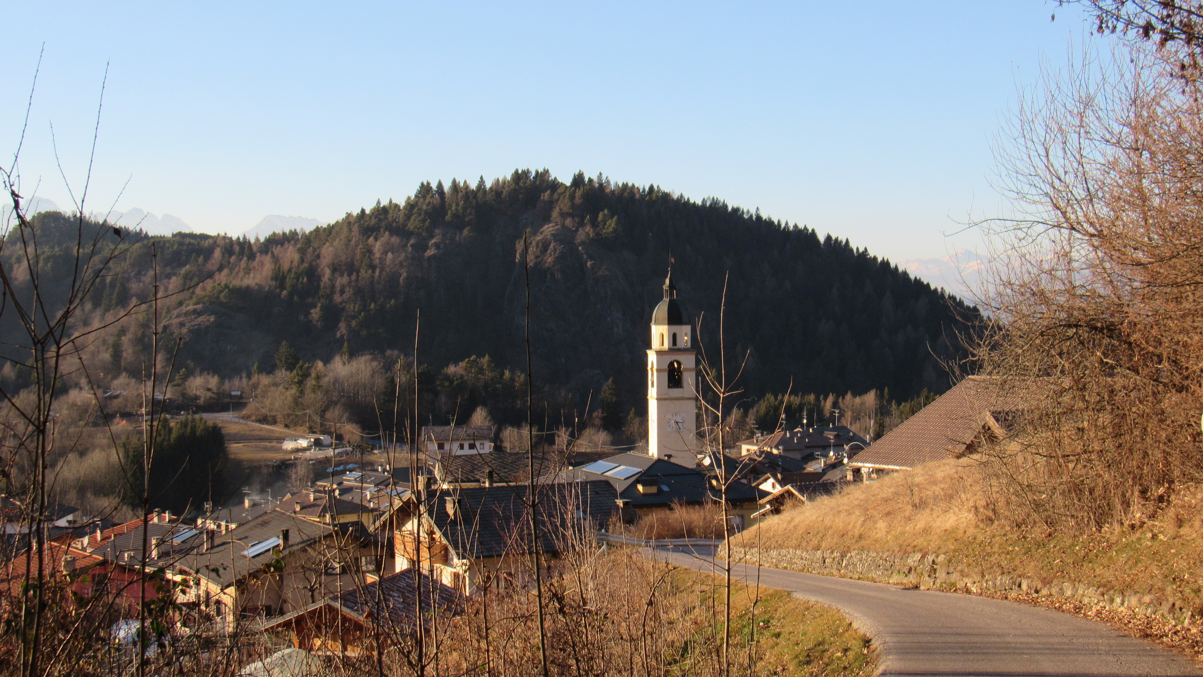 Il nucleo di Faida con il campanile della chiesa visto scendendo da est, provenendo dalla località "Prà di Sotto".